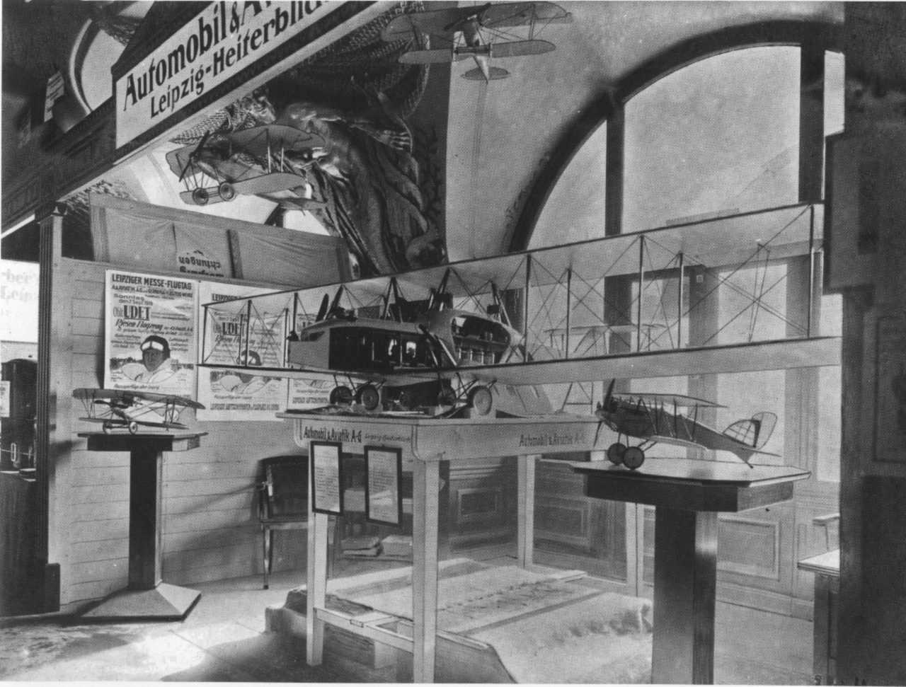 Messestand der Automobil & Aviatik AG aus Leipzig-Heiterblick zur Herbstmesse 1919.